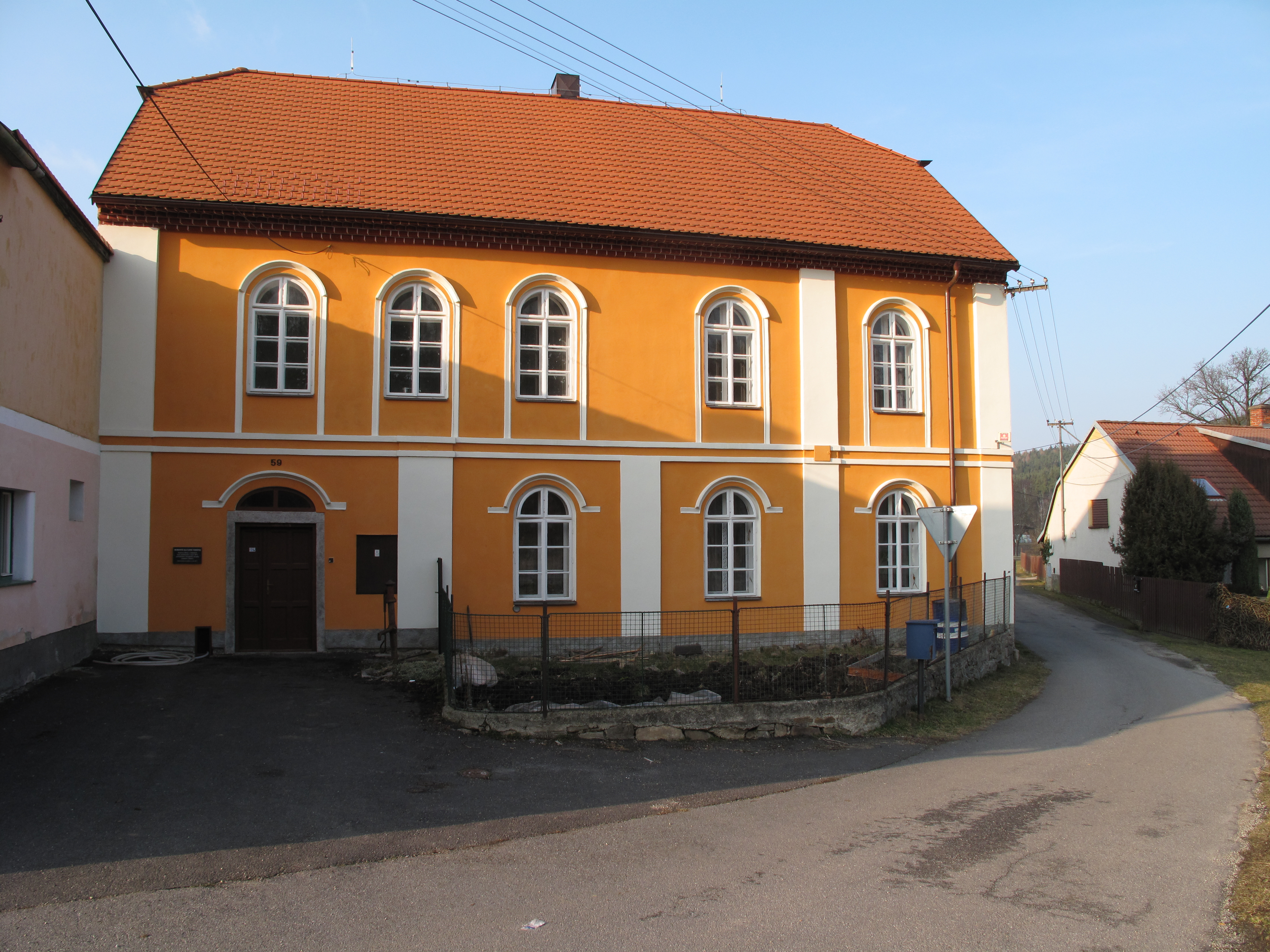 Dům v Zálezlech. Okres Prachatice, Česká republika.